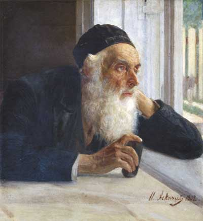 Исаак Аскназий Старик еврей. 1902 г. Смоленский государственный музей-заповедник